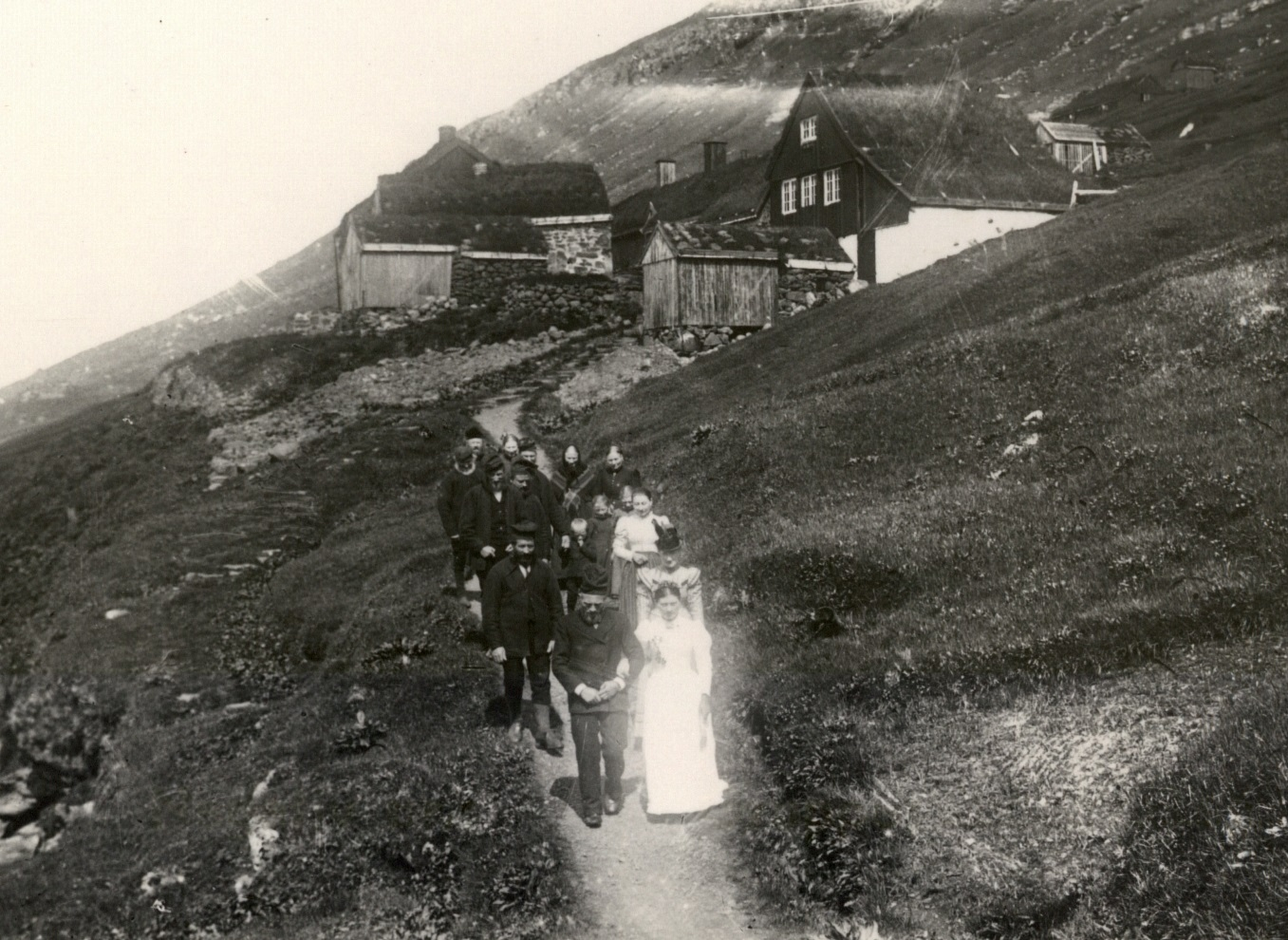 Brudefolk med følge på vej til landingsstedet for at ro til kirke. Bruden er i hvid (“dansk”) brudedragt og også brudgommen bærer “danske klæder”, men færøsk hue. Fotografiet er spejlvendt.